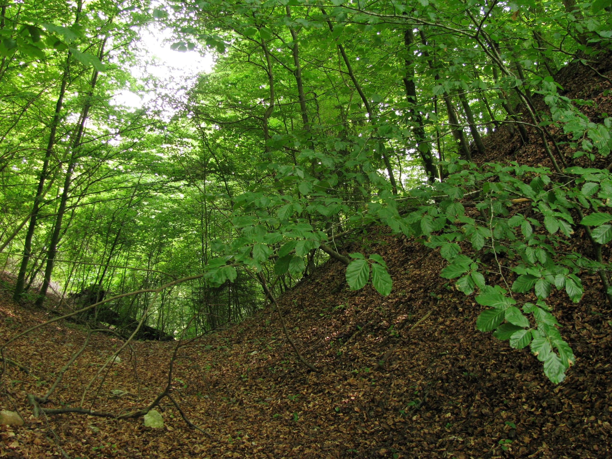 Halsgraben nordöstlich der Hauptburg, nach Südosten.